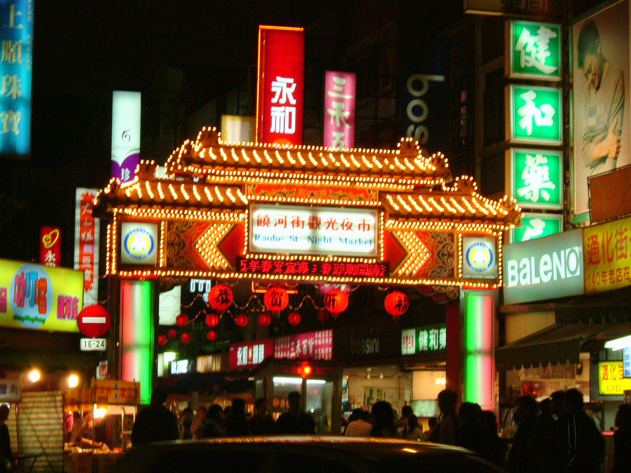 饒河街觀光夜市東口。